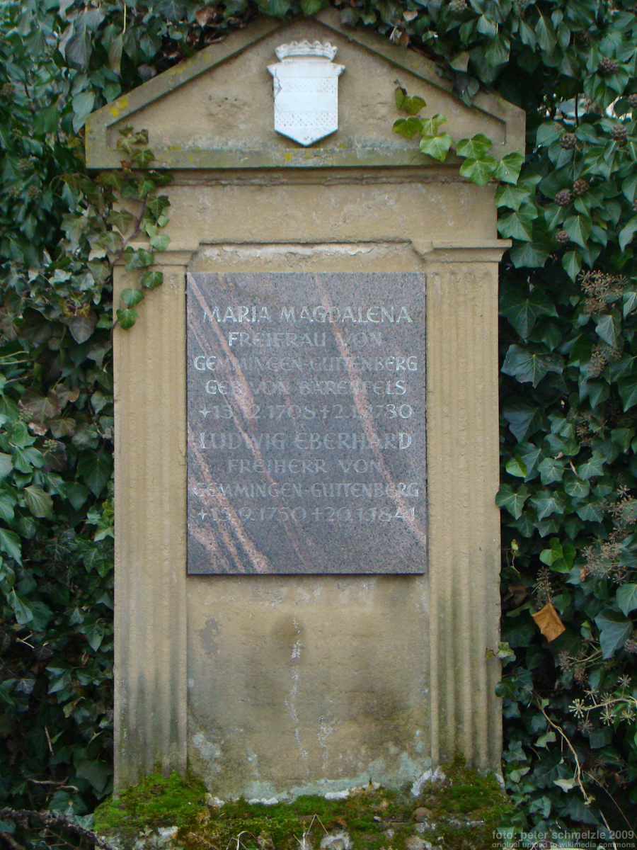 Grabmal für Freifrau Maria Magdalena von Gemmingen-Guttenberg (1708-1780) und ihren Sohn Freiherr Ludwig Eberhard von Gemmingen-Guttenberg (1750-1841) auf dem Friedhof in Bad Rappenau-Bonfeld